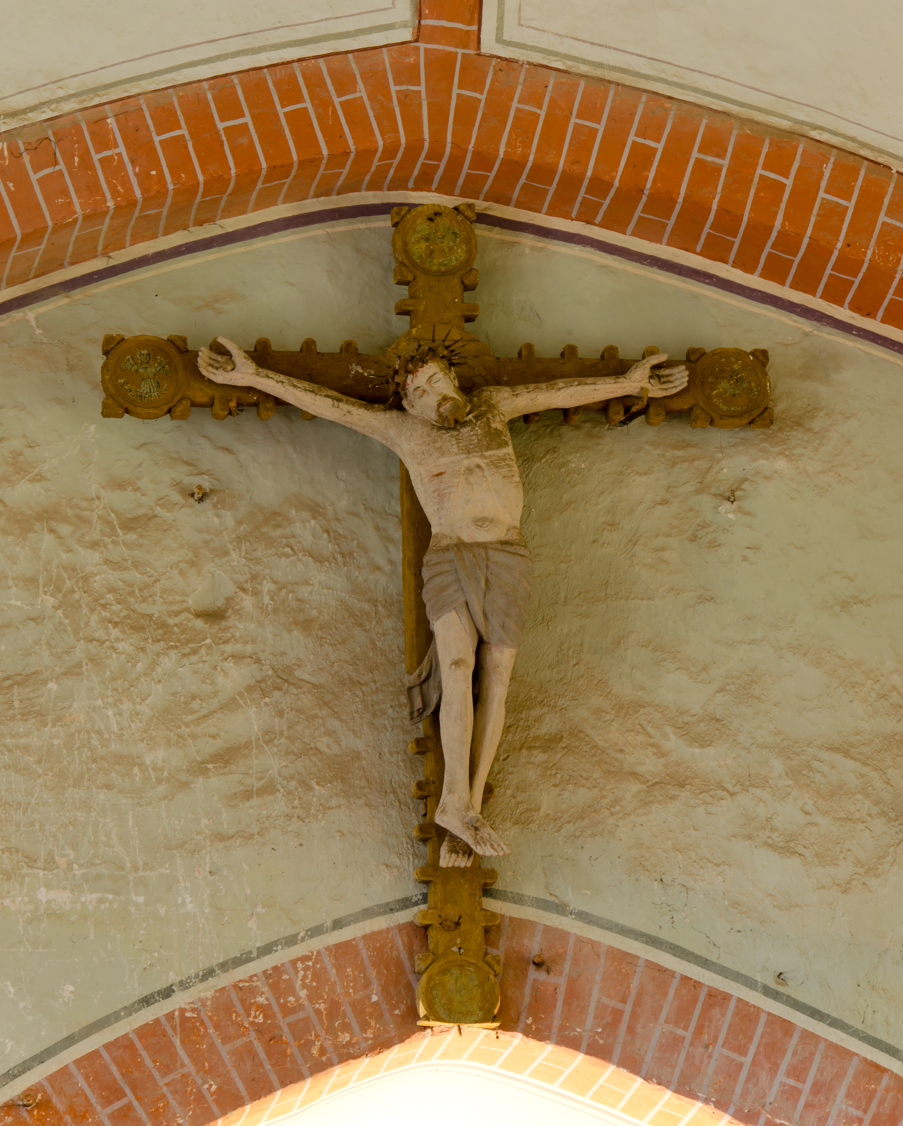 Neukirchen Kirche, Triumphkreuz